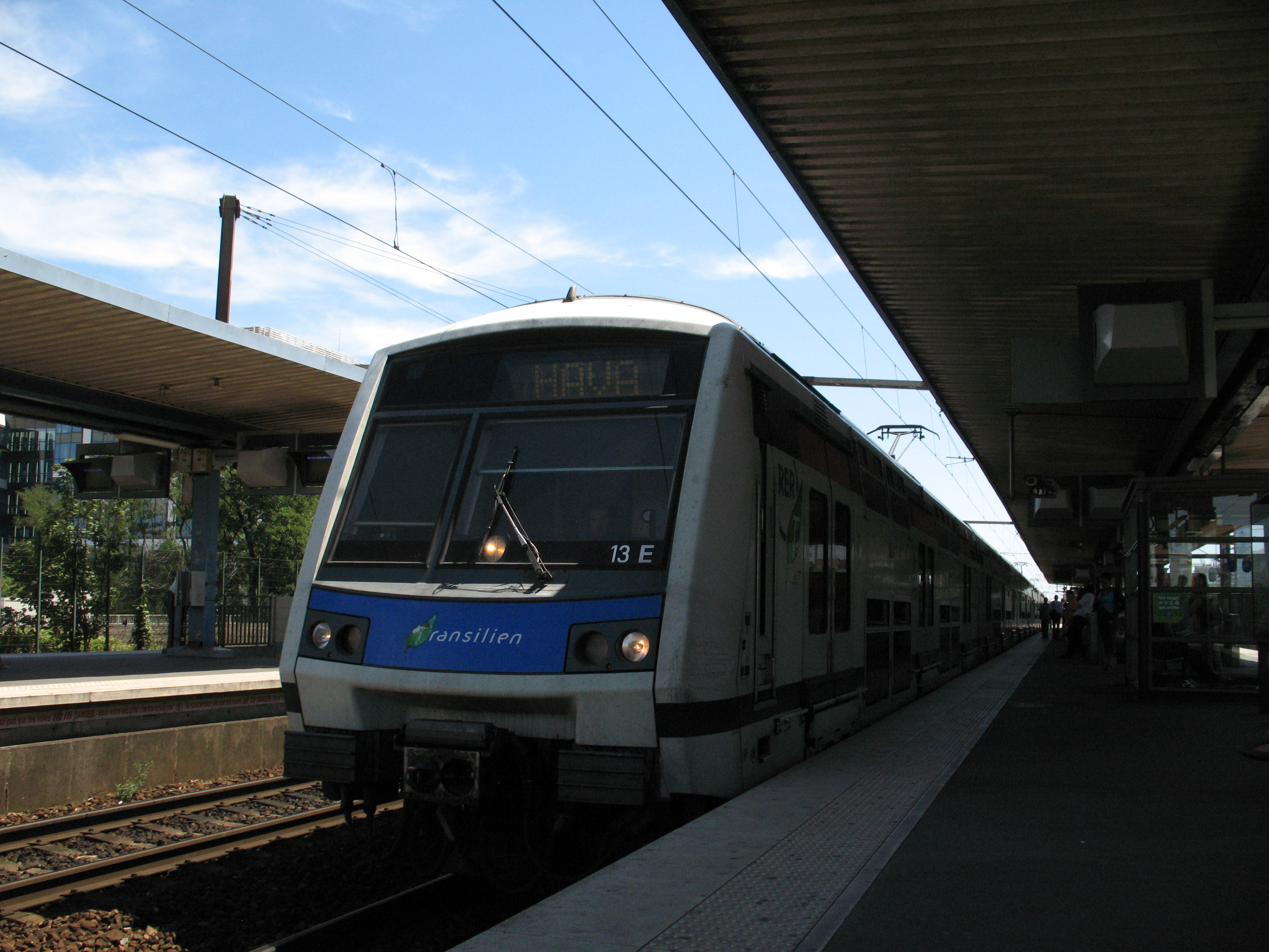 Rame Z 20500 RER E à Val de Fontenay